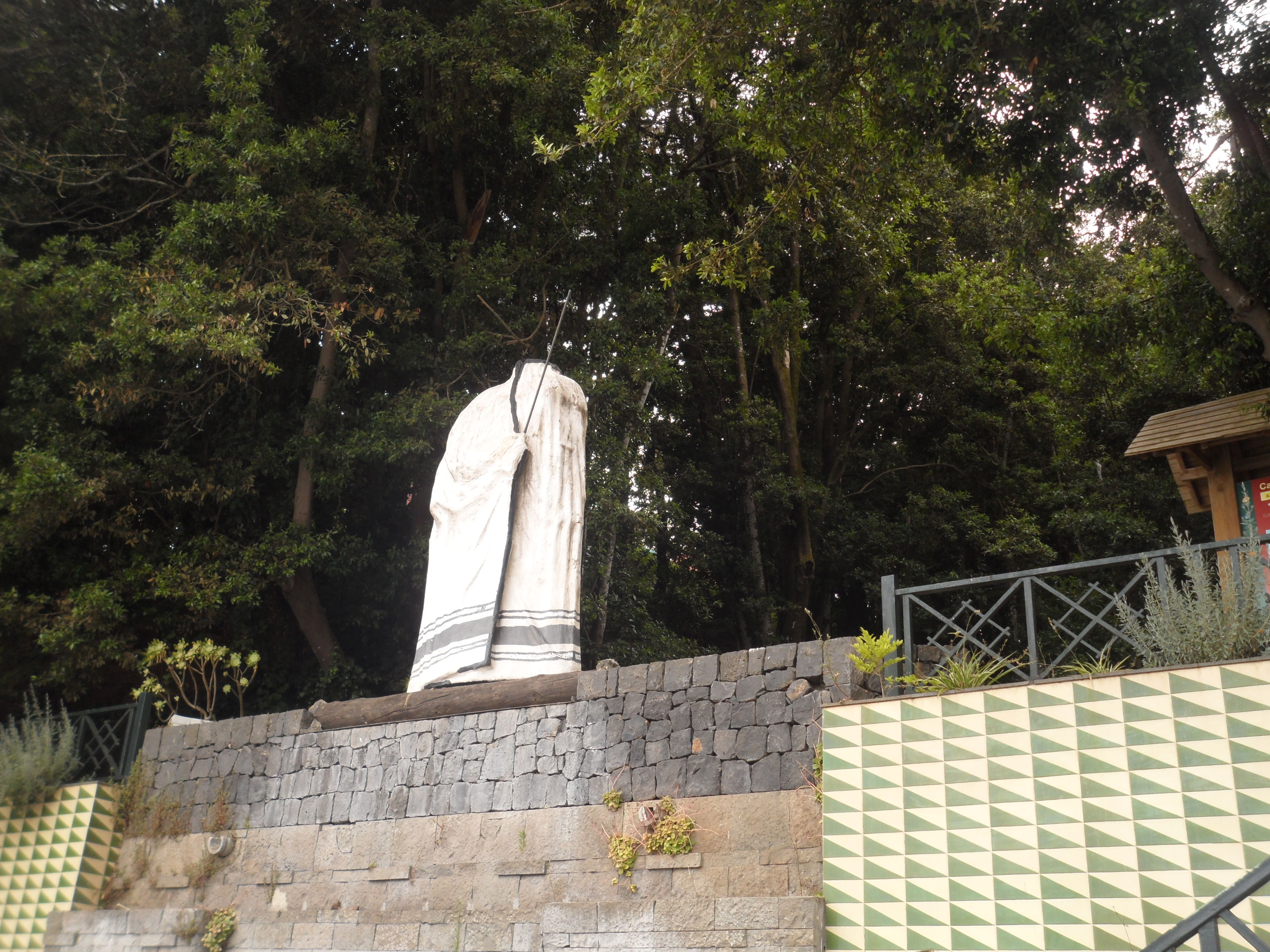 Bosque del Adelantado 9